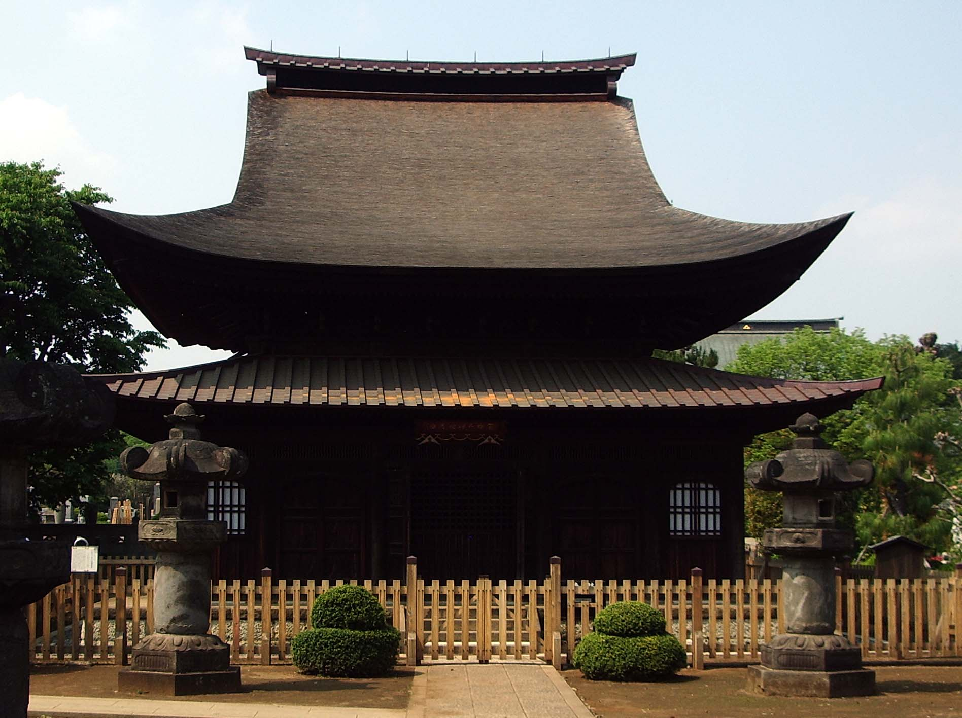 Shofukuji, Higashimurayama, Tokyo. A National Treasure of Japan